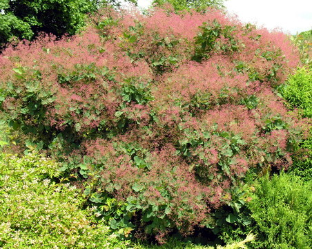 Europinis pūkenis (Cotinus coggygria) Šeima. Anakardiniai (Anacardiaceae) Foto: Algirdas, 2006 m. birželio 29 d., Lietuva. Fotografuota Klaipėdos universiteto botanikos sode.